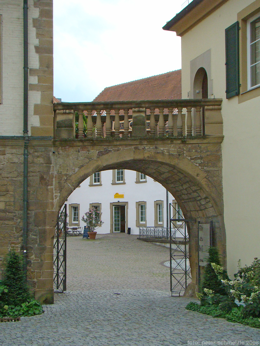 Detail vom Deutschhof in Heilbronn